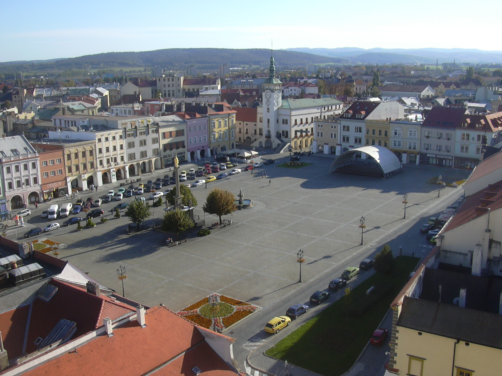 Náměstí Kroměříž - pohled z věže arcibiskupského zámku